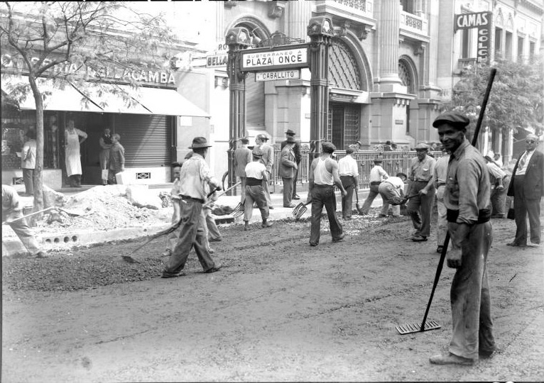 Entrada al andén Pasco sur en 1938, durante una obra de repavimentación de la Avenida Rivadavia. Detrás, la Casa del Pueblo